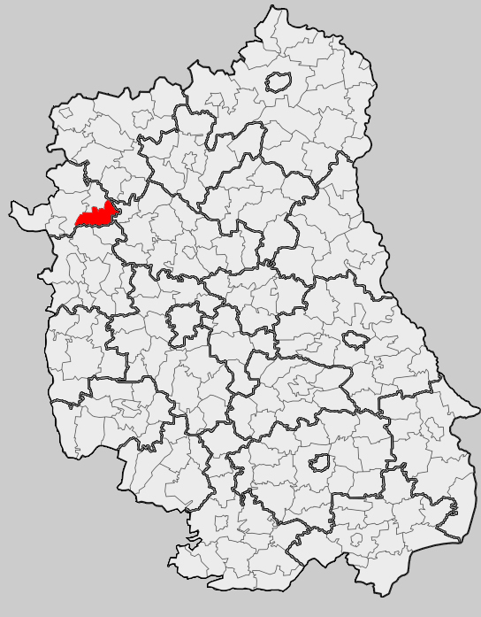 Map of gmina Ułęż, Ryki county, Lublin voivodship Mapa gminy Ułęż, powiat rycki, województwo lubelskie